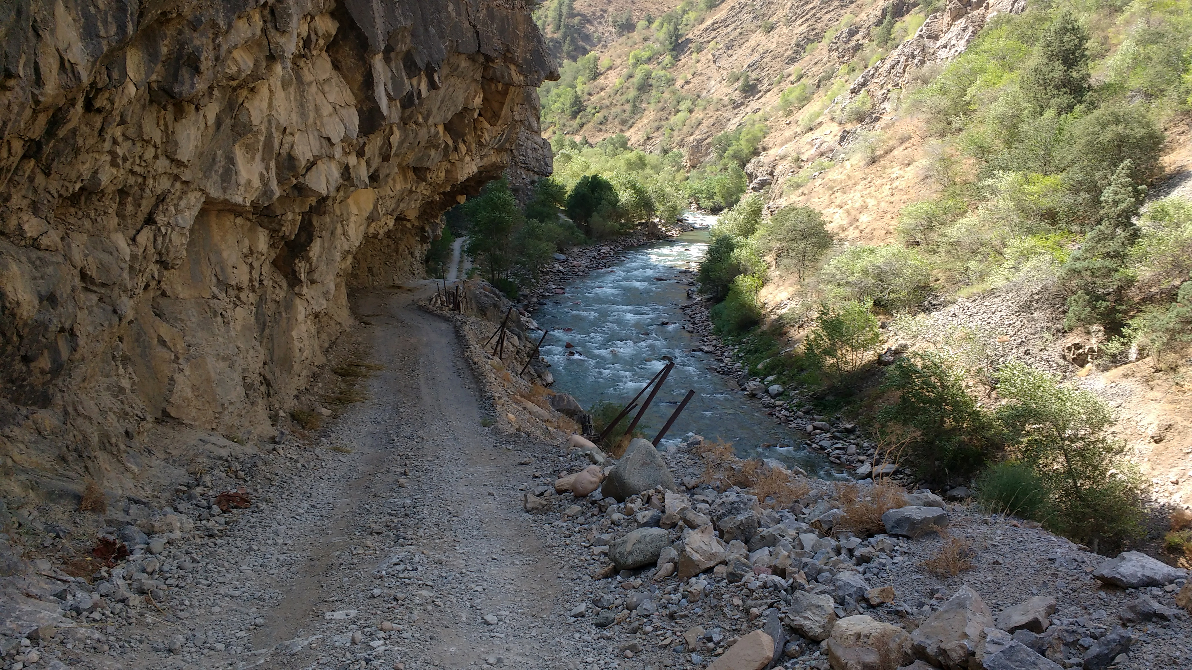 Нижнее течение Акбулака. Вдоль реки идёт бывшая геологическая дорога, пробитая в скале.